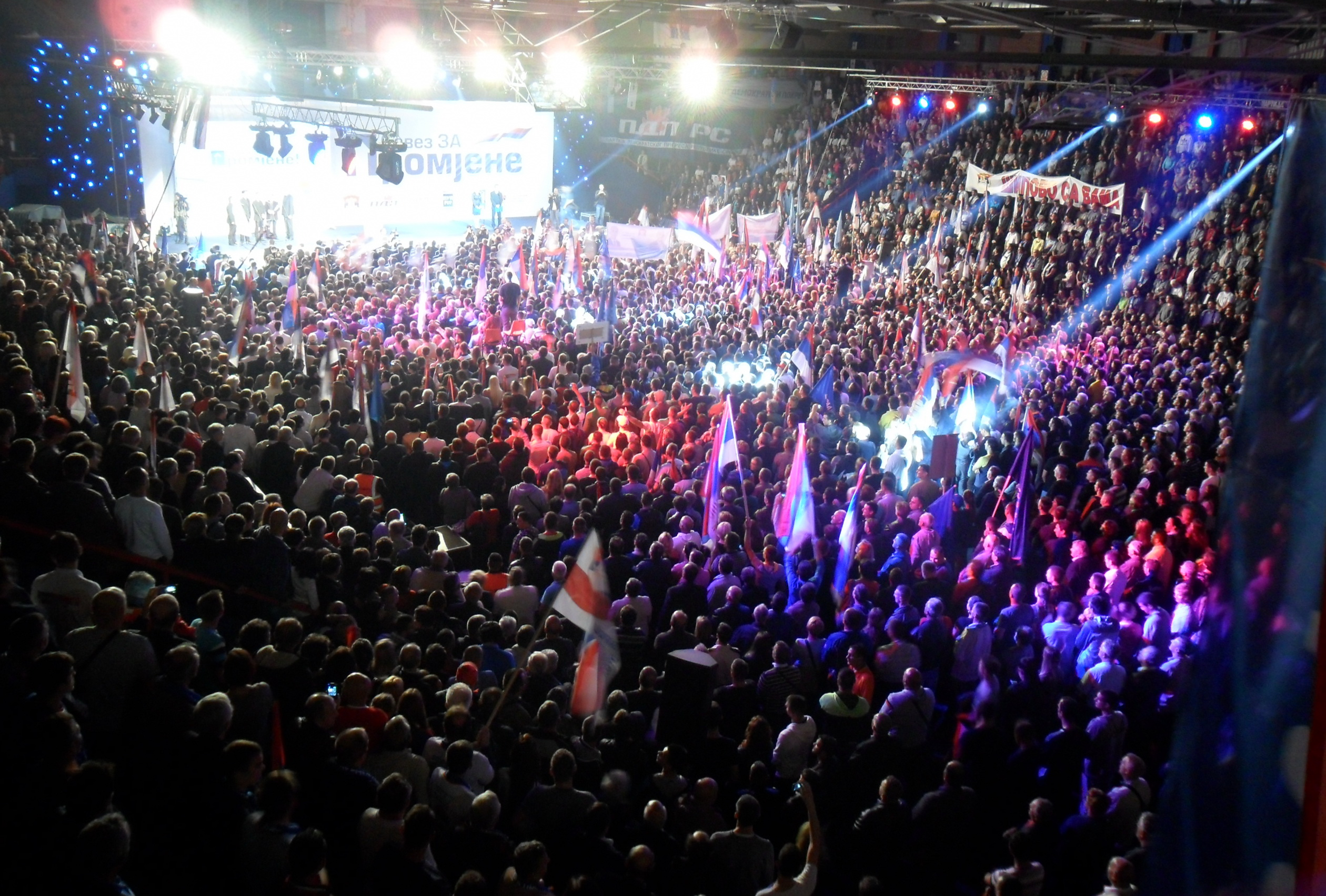 Српски (ћирилица): Митинг Савеза за промјене у Бањој Луци, 12. септембра 2014.